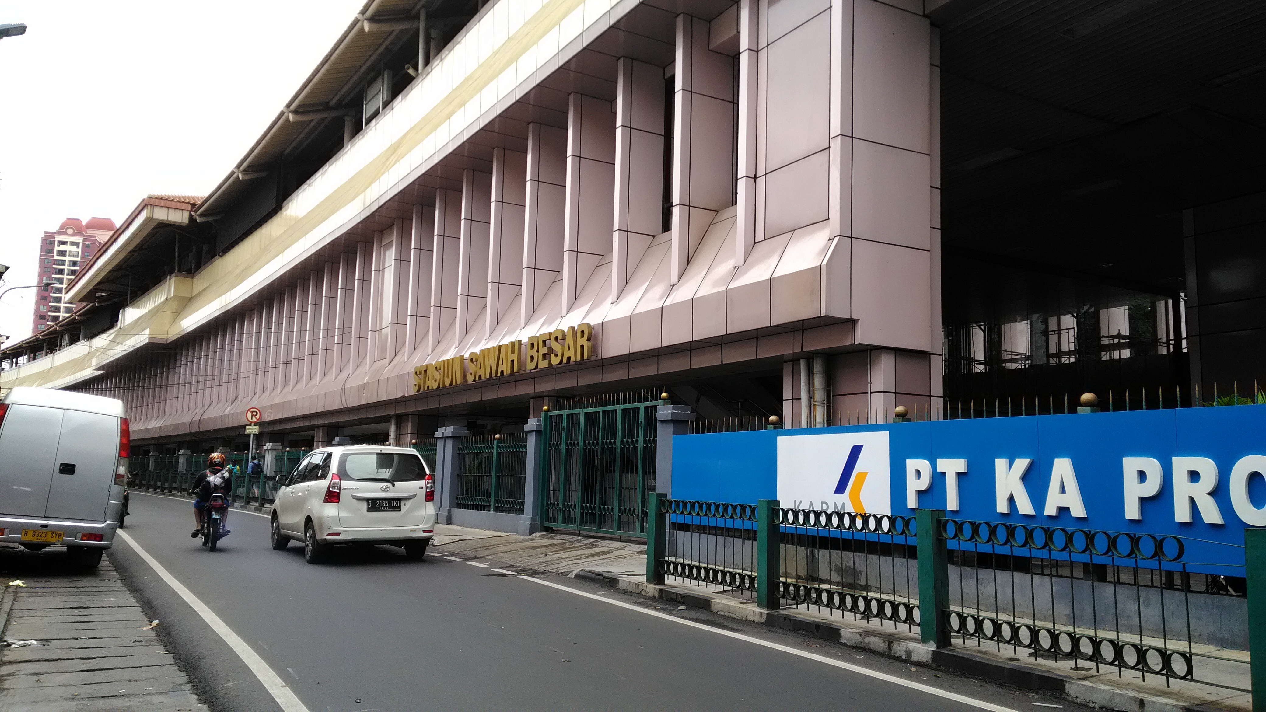 Sunda: Stasion Sawah Besar, 2020